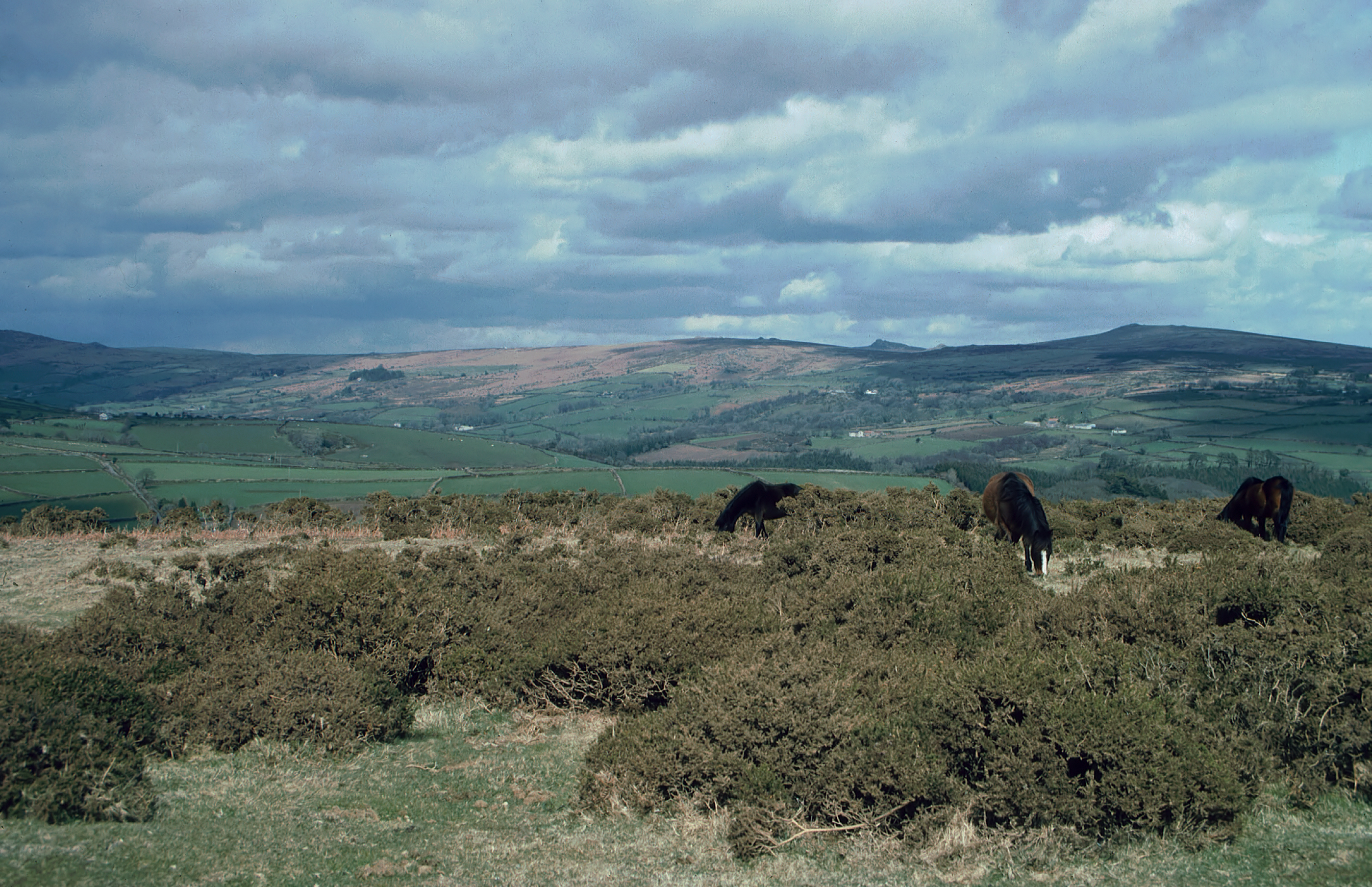 Wild ponies grazing in Dartmoor, Devon/UK